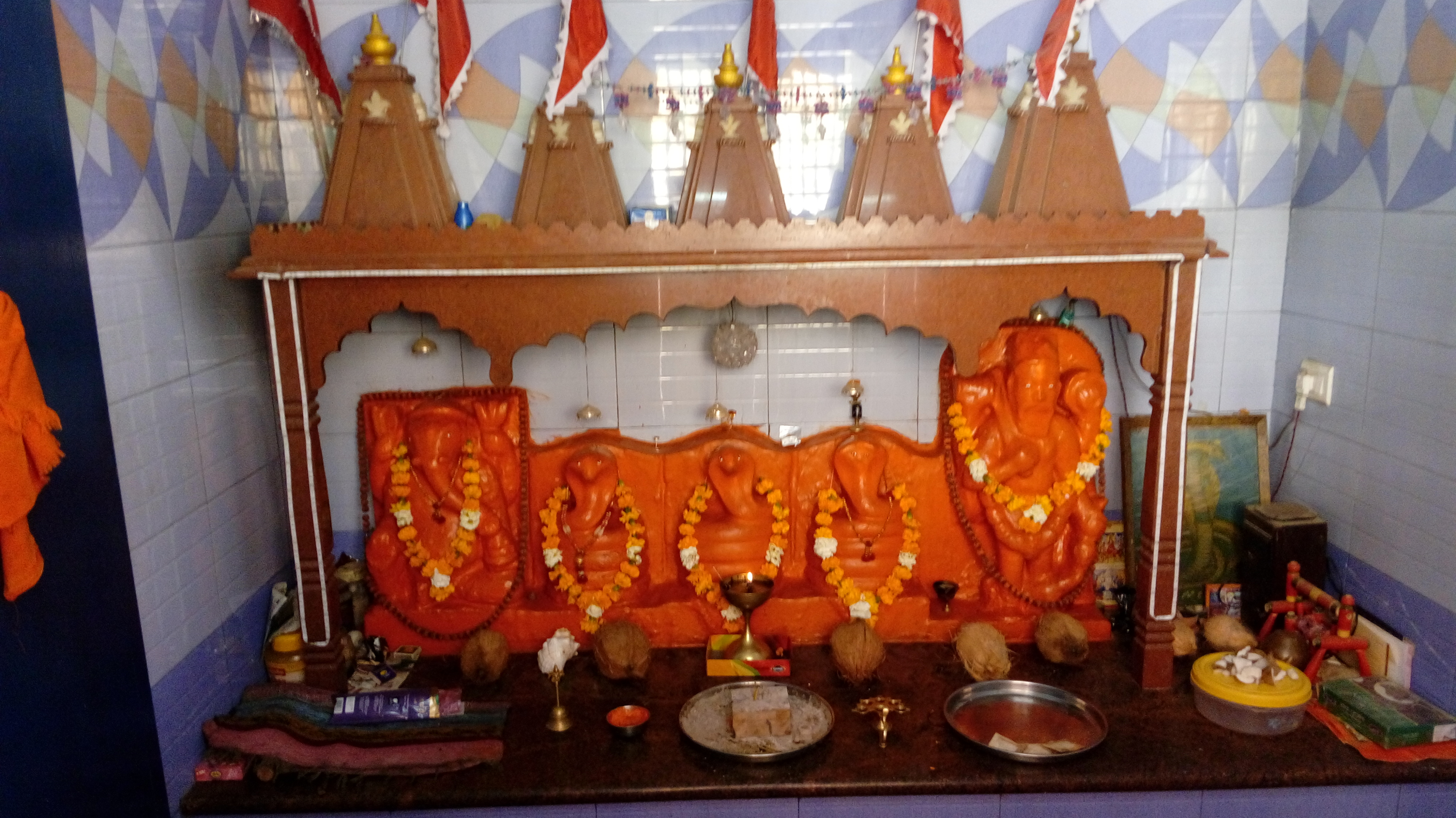 Bhujang Naga of Bhujang Naga Temple, Bhujia Fort, Bhujia Hill, Bhuj, Kutch, Gujarat, India